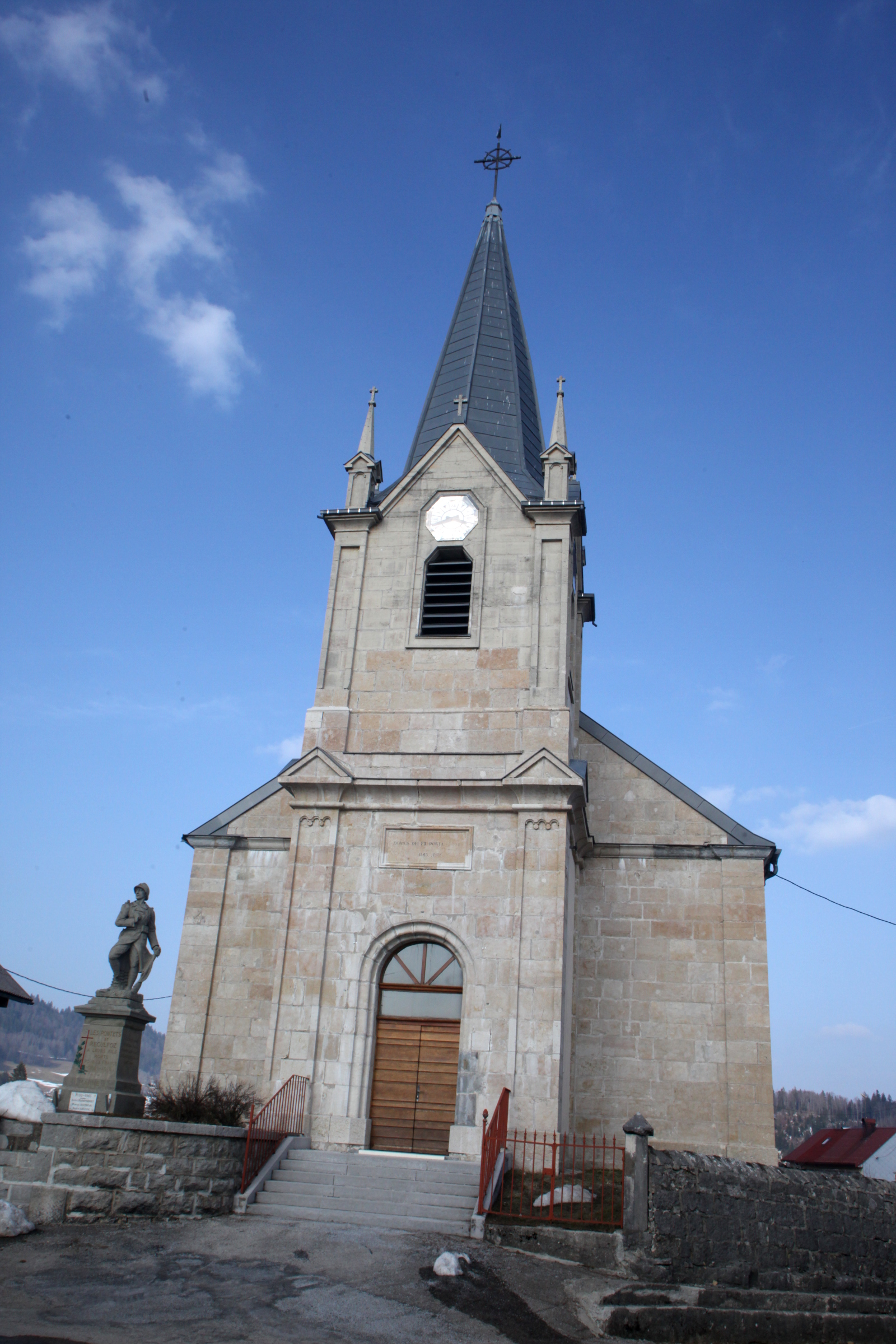 Eglise des Pontets (Doubs)